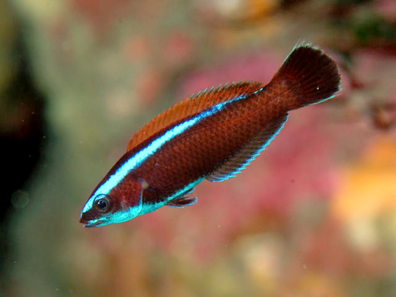 ブダイベラ Pseudodax moluccanus